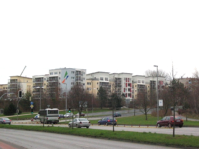 Umgebaute Plattenbauwohnungen in Neu Zippendorf (zu DDR-Zeiten: 2. Bauabschnitt des Großen Dreesches) in Schwerin, Germany